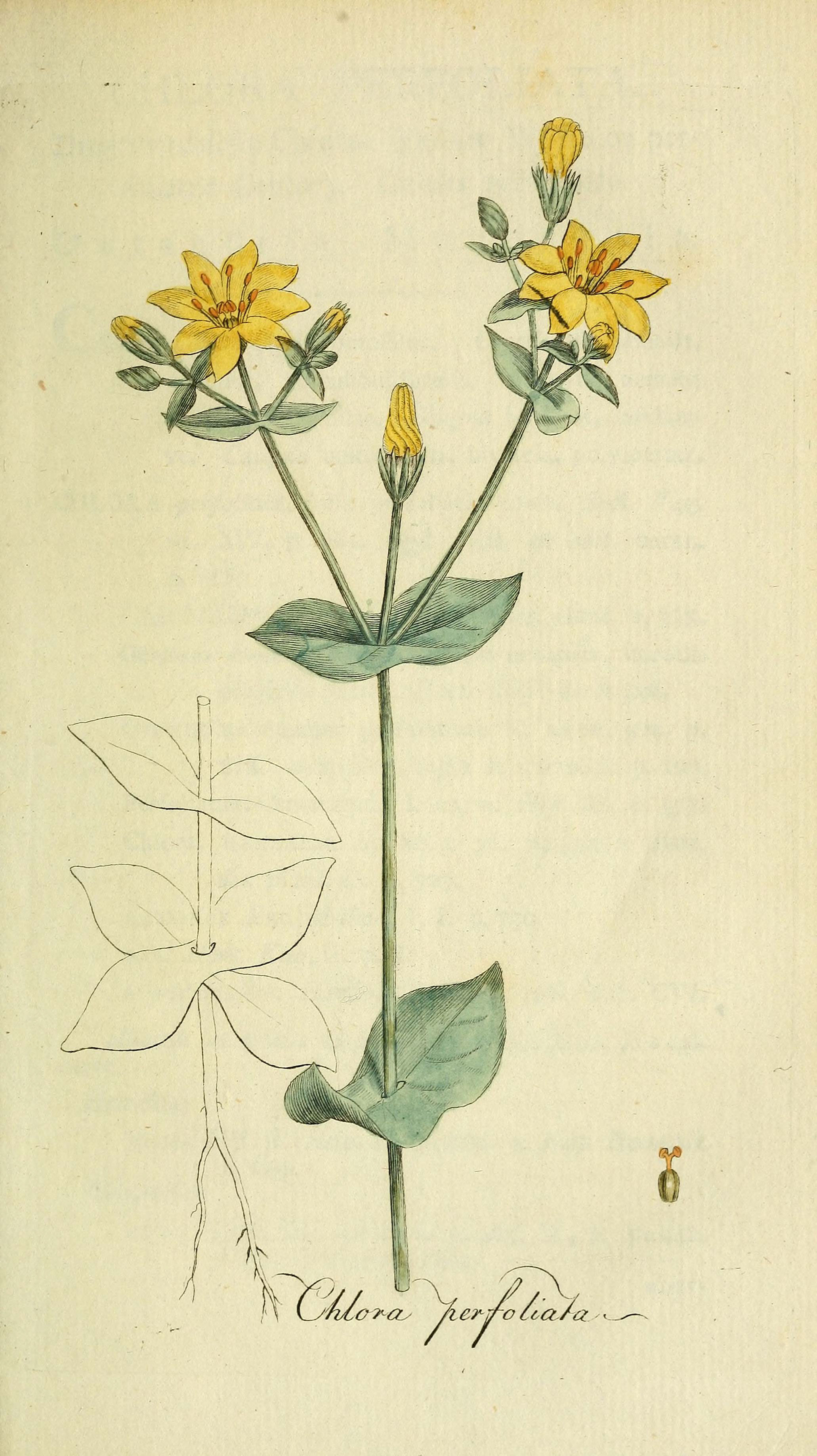 M K-jMo-t-os Aer-jro ciaJ-a